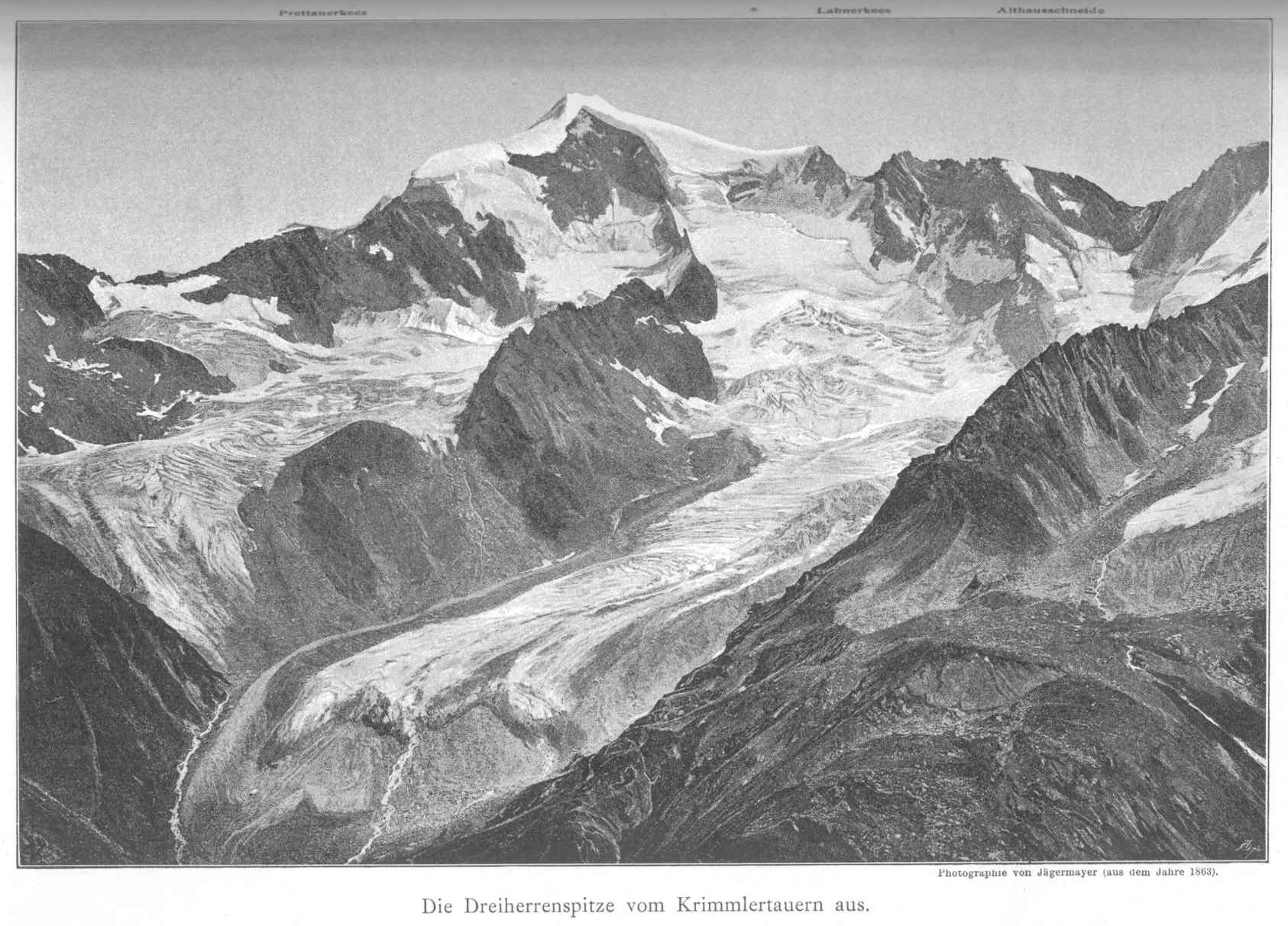 Dreiherrnspitze (3499 m), Venedigergruppe, Untergruppe der Hohen Tauern